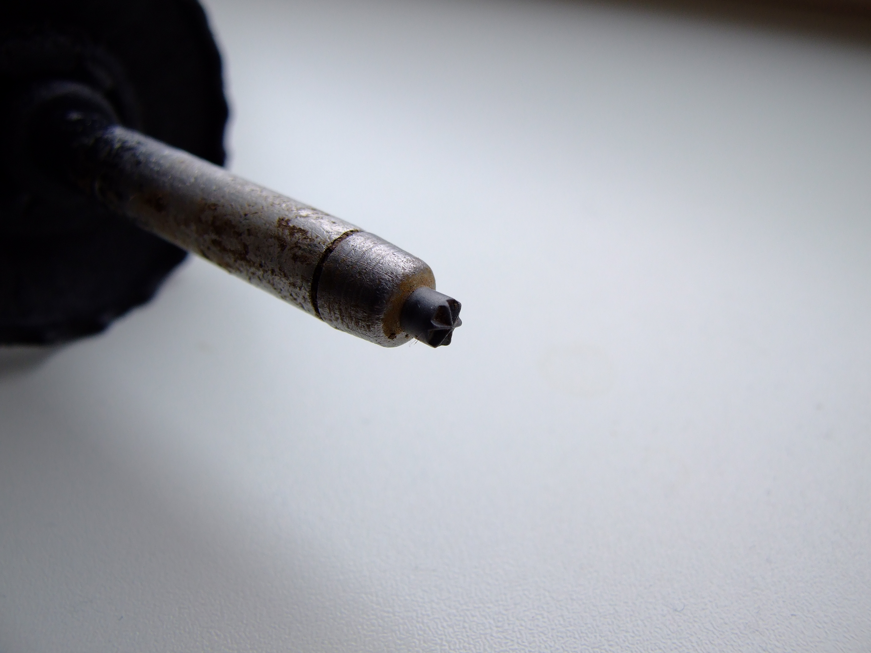 Spitze eines Trekkingstocks